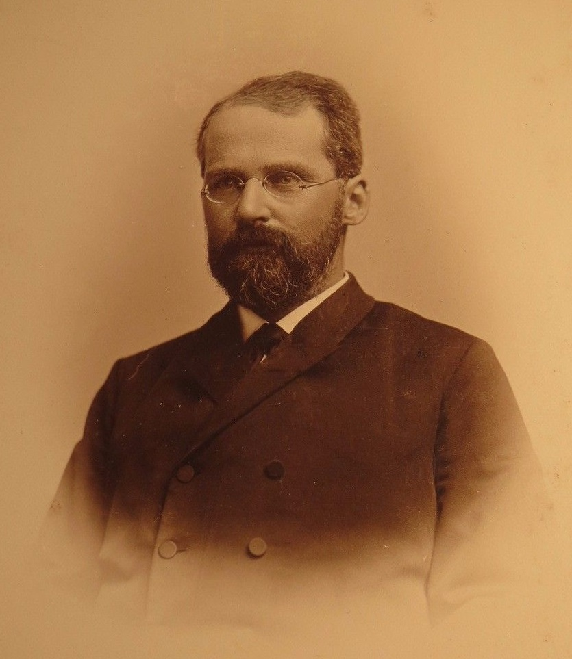 Theodor von Haering - Professor Theologie Tübingen 1894-1925